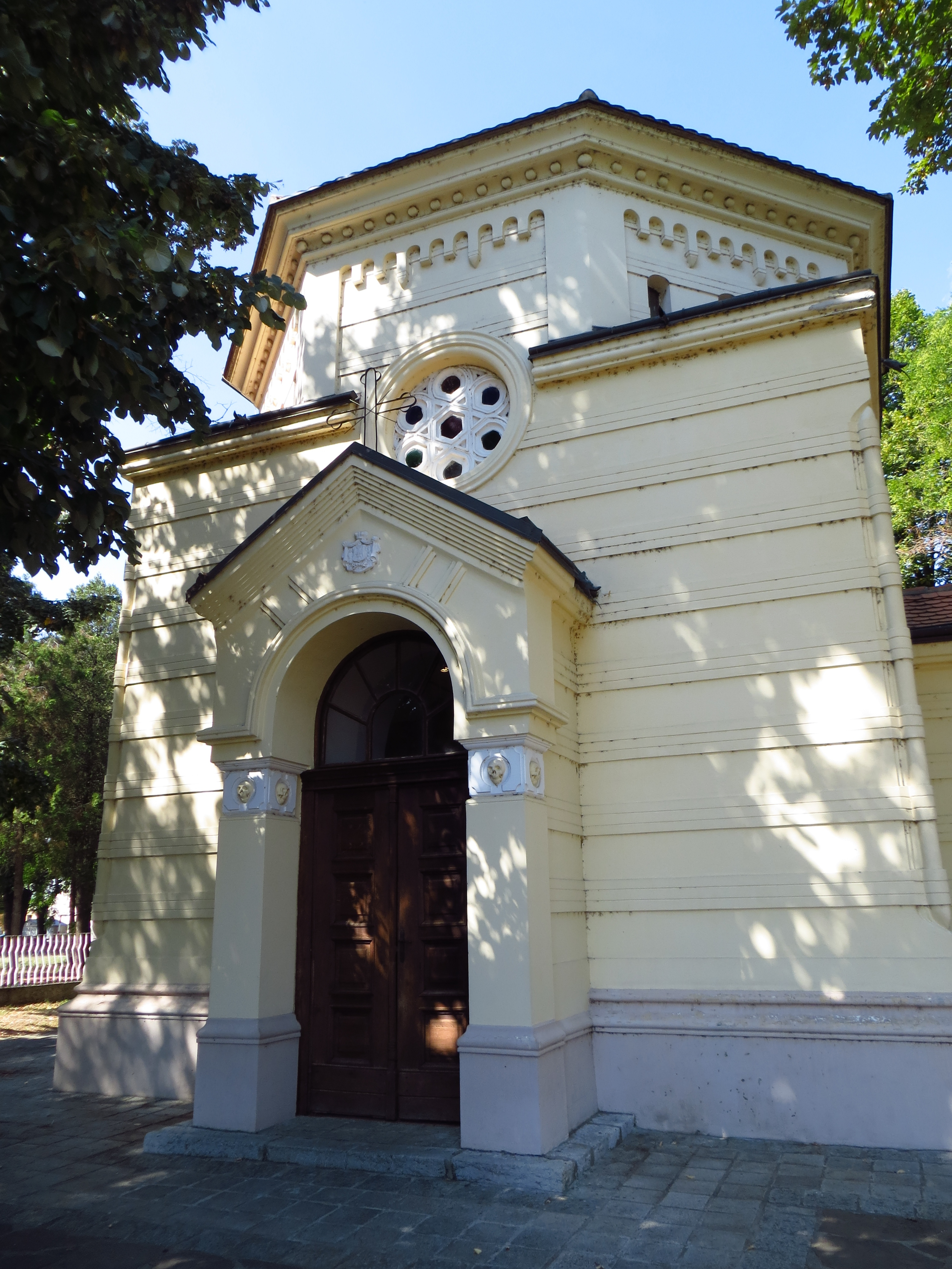 Ćele kula u Nišu slikana spolja